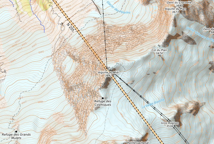 carte réalisée sur umap This map may be incomplete, and may contain errors. Don't rely solely on it for navigation.